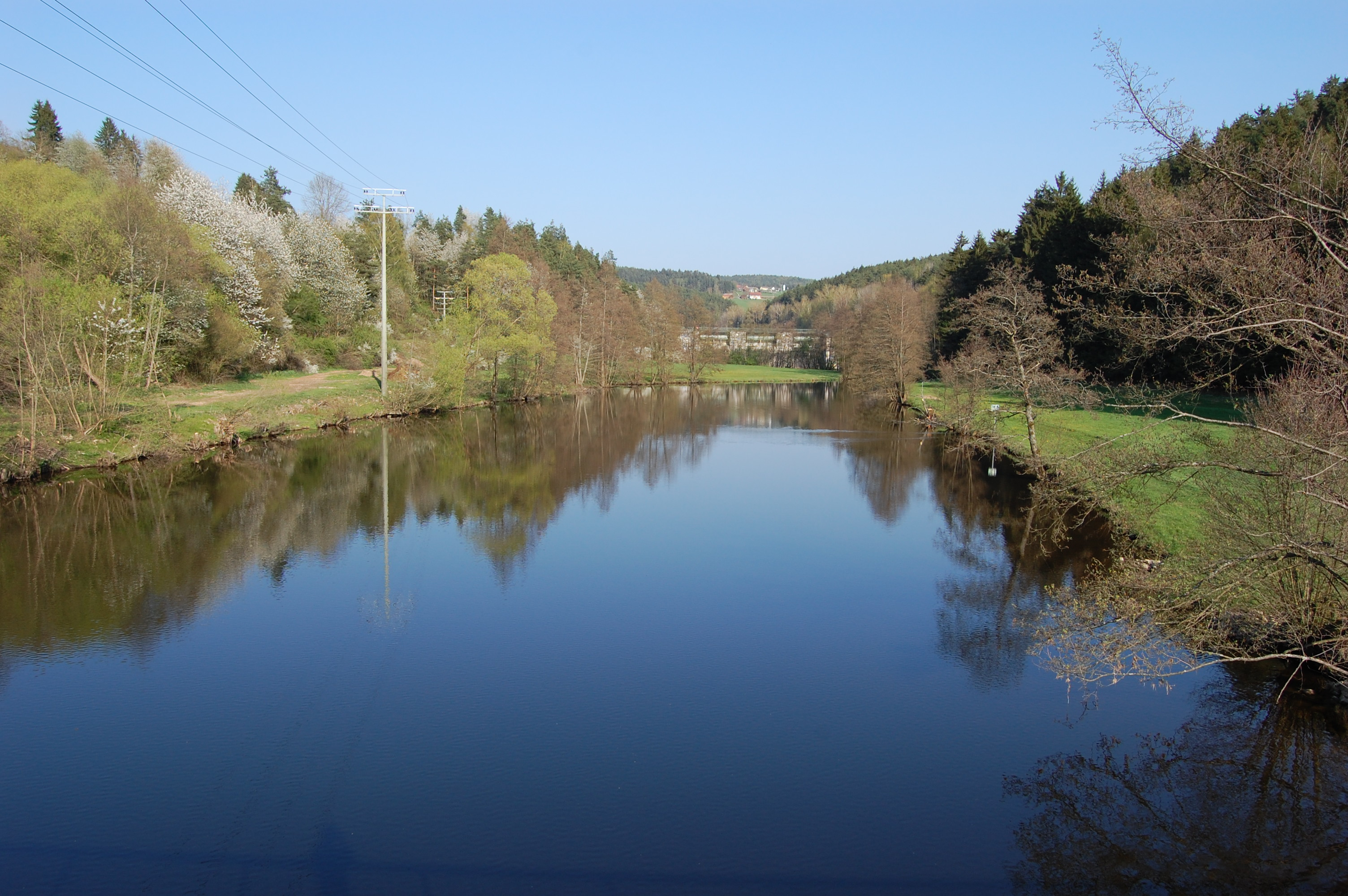 Fluss Pfreimd bei Trausnitz, Blick auf die Staumauer der Pfreimdtalsperre (LWK Trausnitz, Unterwasser) bei Trausnitz, Landkreis Schwandorf, Oberpfalz, Bayern (2011)